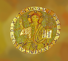 Detall Tapís de la Creació. Pantocràtor. Segles XI-XII